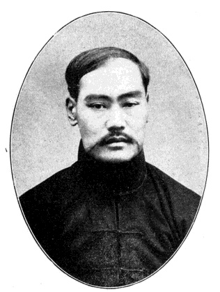 中文（台灣）: 中華民國國會議員